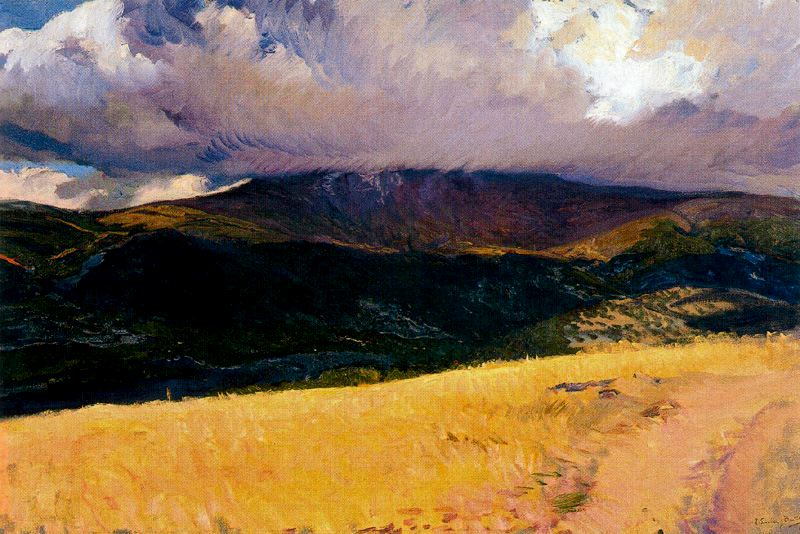 Sorolla pinta desde el llano segoviano (Segovia, España) las alturas del pico de Peñalara, el más alto de la Sierra de Guadarrama, cernidas por el cobalto del aguacero. La enfermedad de su hija primogénita, los estudios, bocetos y cartones preparativos de su magna obra para la Hispanic Society of America y la circunstancia de tener casa de verano en el pueblo serrano de Cercedilla (Madrid), explican la repetida presencia del Guadarrama en muchas de sus obras.